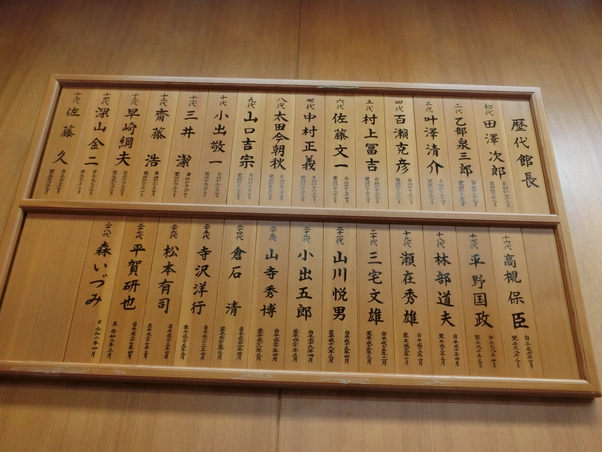 県立長野図書館の歴代館長を示した額（館長室内掲示）